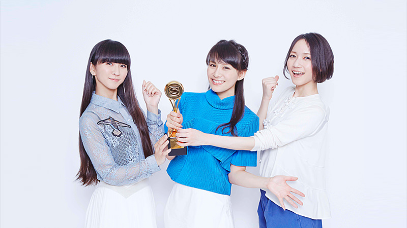 Perfume